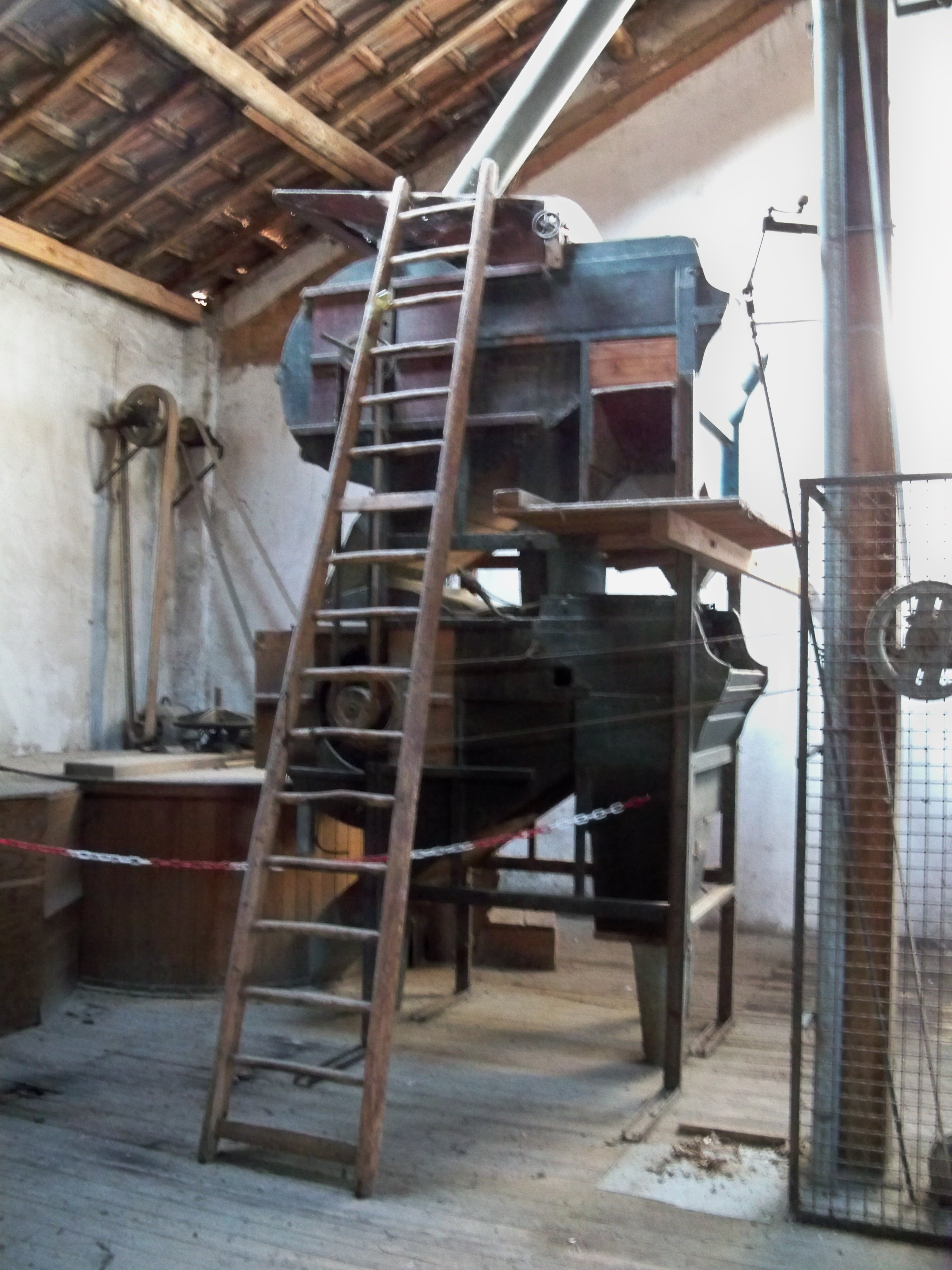 Intérieur de la Graineterie Aimé Roux, Carpentras (84) .